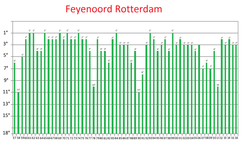 Resultados del Feyenoord en la Eredivisie hasta la Eredivisie 2015-16.